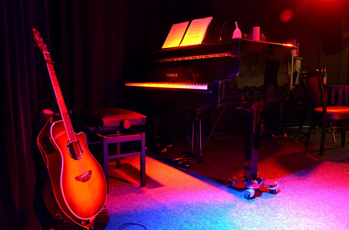 Impressionen vom und im Theater am Küchengarten (TAK) in Hannover, der Kabarettbühne im denkmalgeschützten Sockelgeschoss der 1927 unter Karl Elkart erbauten Städtischen Bäder in Hannover-Linden. Aus Zeitgründen wurde hier zunächst auf eine Einzelbeschreibung der Fotografien verzichtet; Details können Sie jedoch auch ohne Ihre eigene Arbeit schon jetzt aus dem jeweiligen Dateinamen entnehmen ...